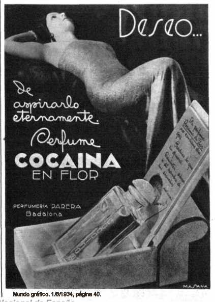 Perfume Cocaina en flor